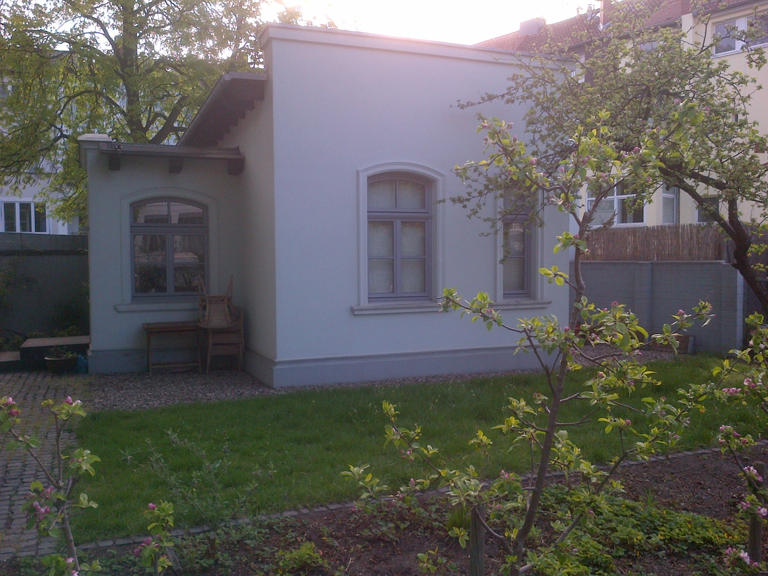 Ehemaliges jüdisches Krankenhaus Hannover - Totenhaus, jetzt Gedenk- und Begegnungsstätte